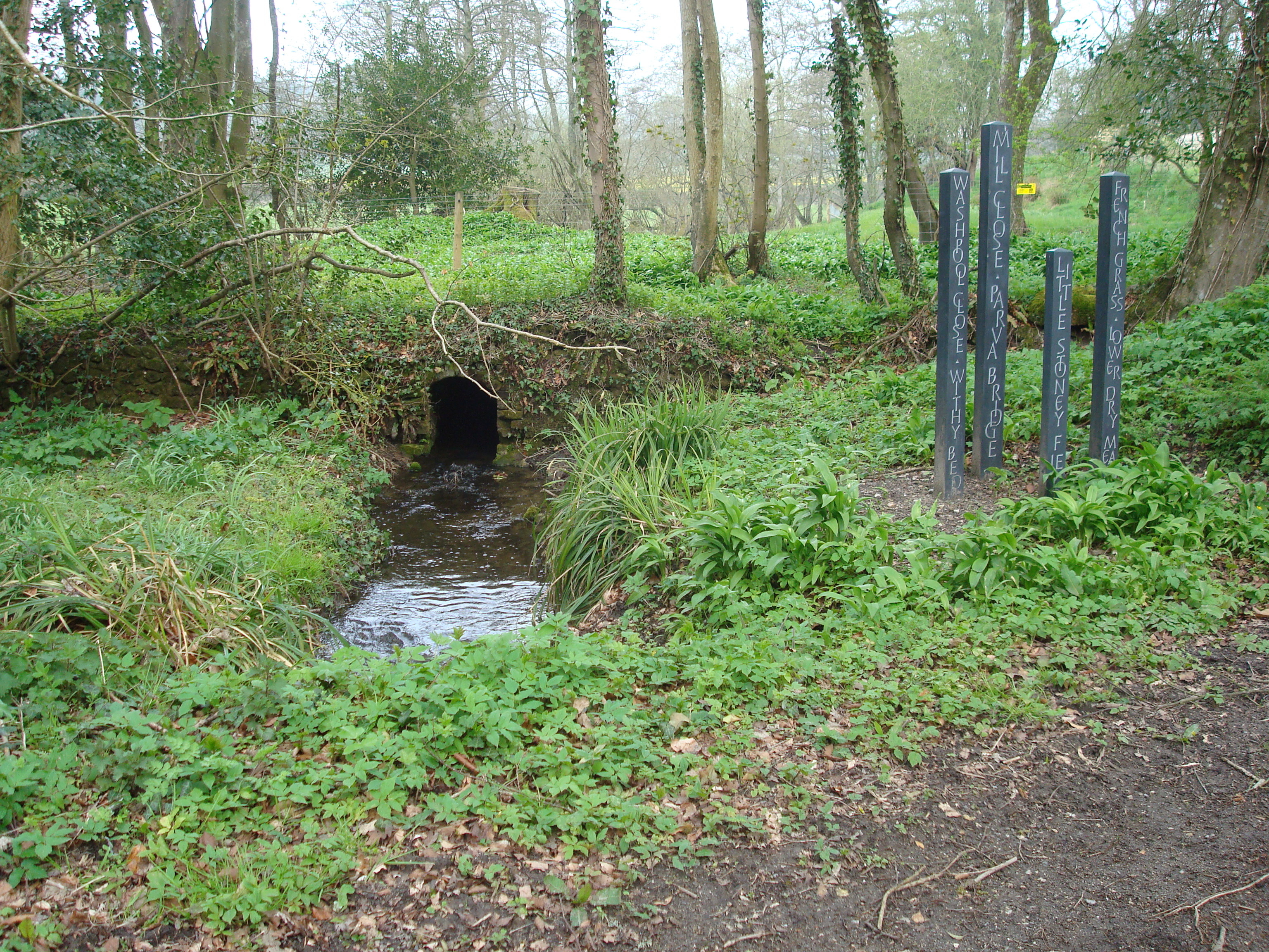 La source de la Cerne, à Minterne Magna (Dorset)